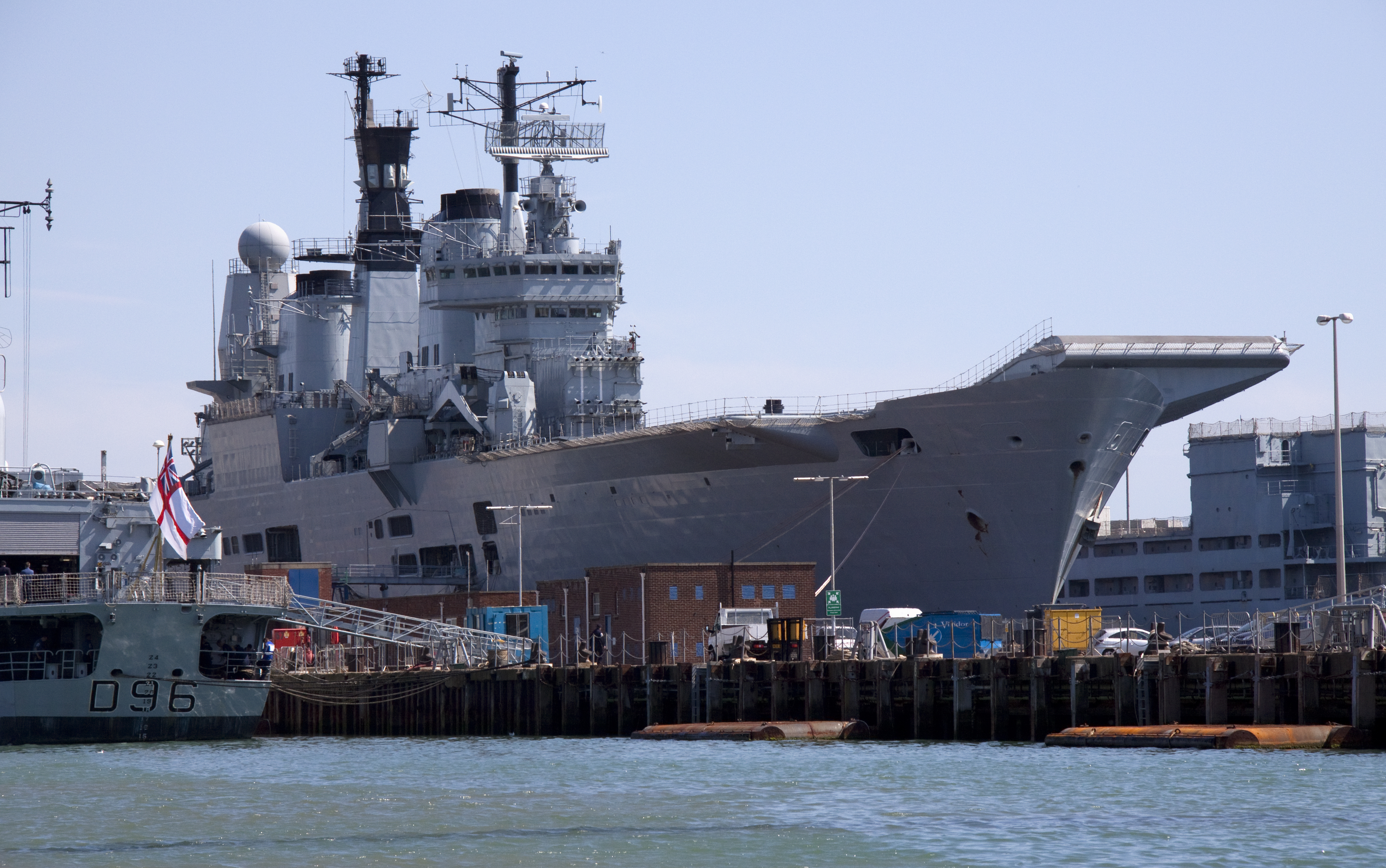 Ark Royal